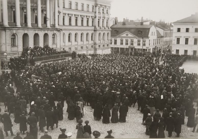 Marraskuun manifestia jaetaan senaatintorilla 6.11.1905